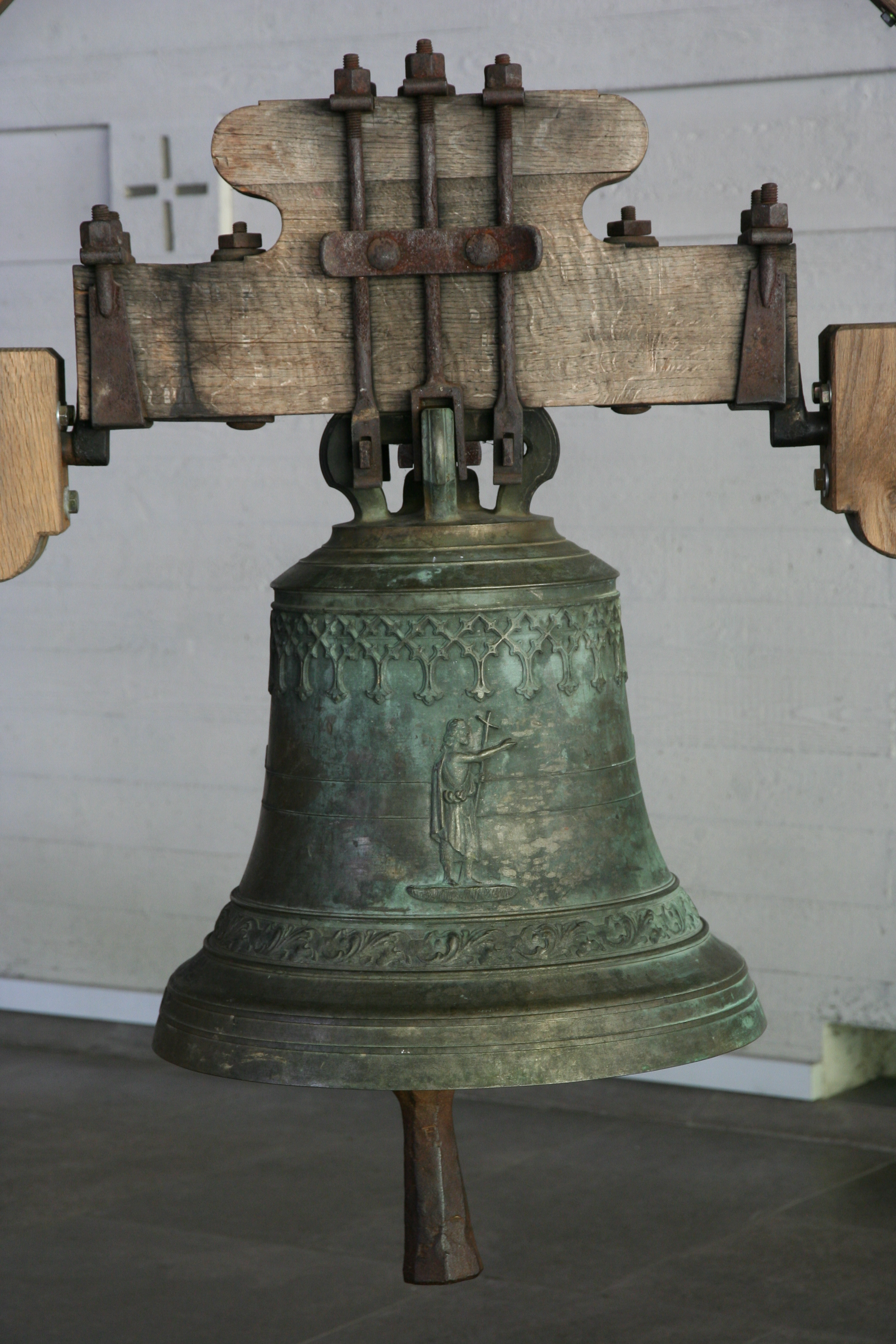 Römisch-katholische Pfarrkirche St. Marien Langnau ZH